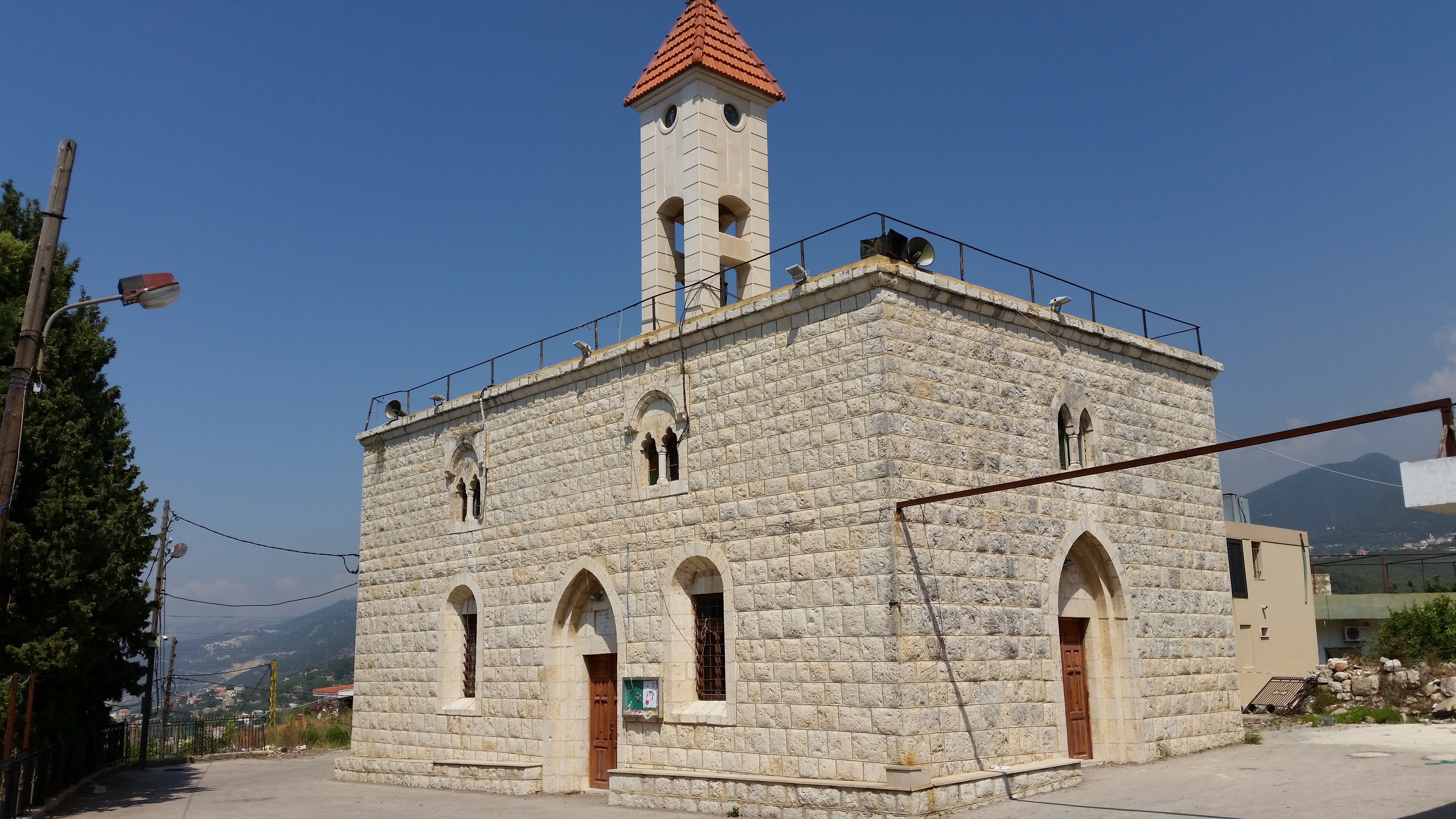 L'église Saint Assia de Kfarfou